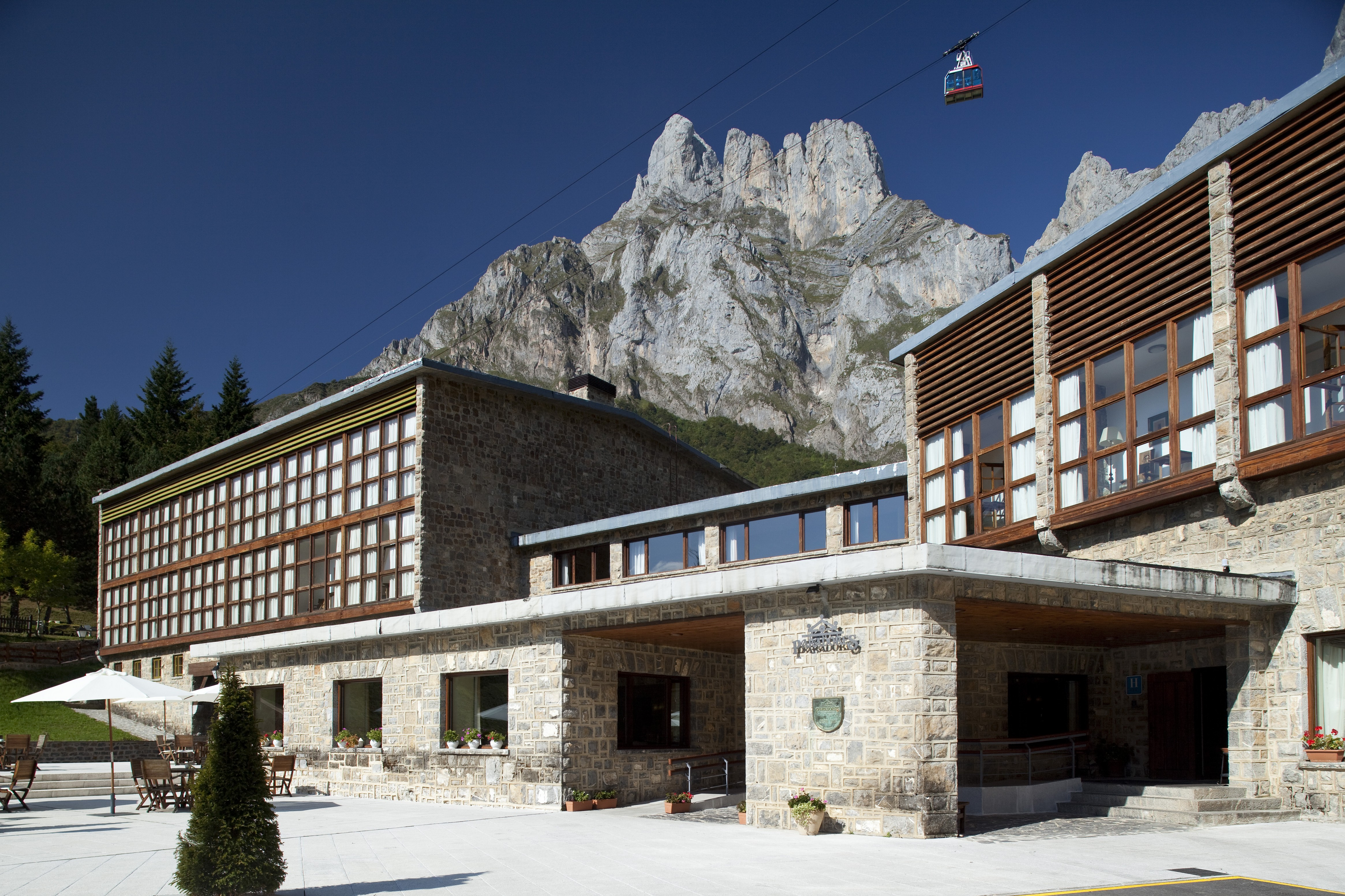 Parador Fuente Dé nieve